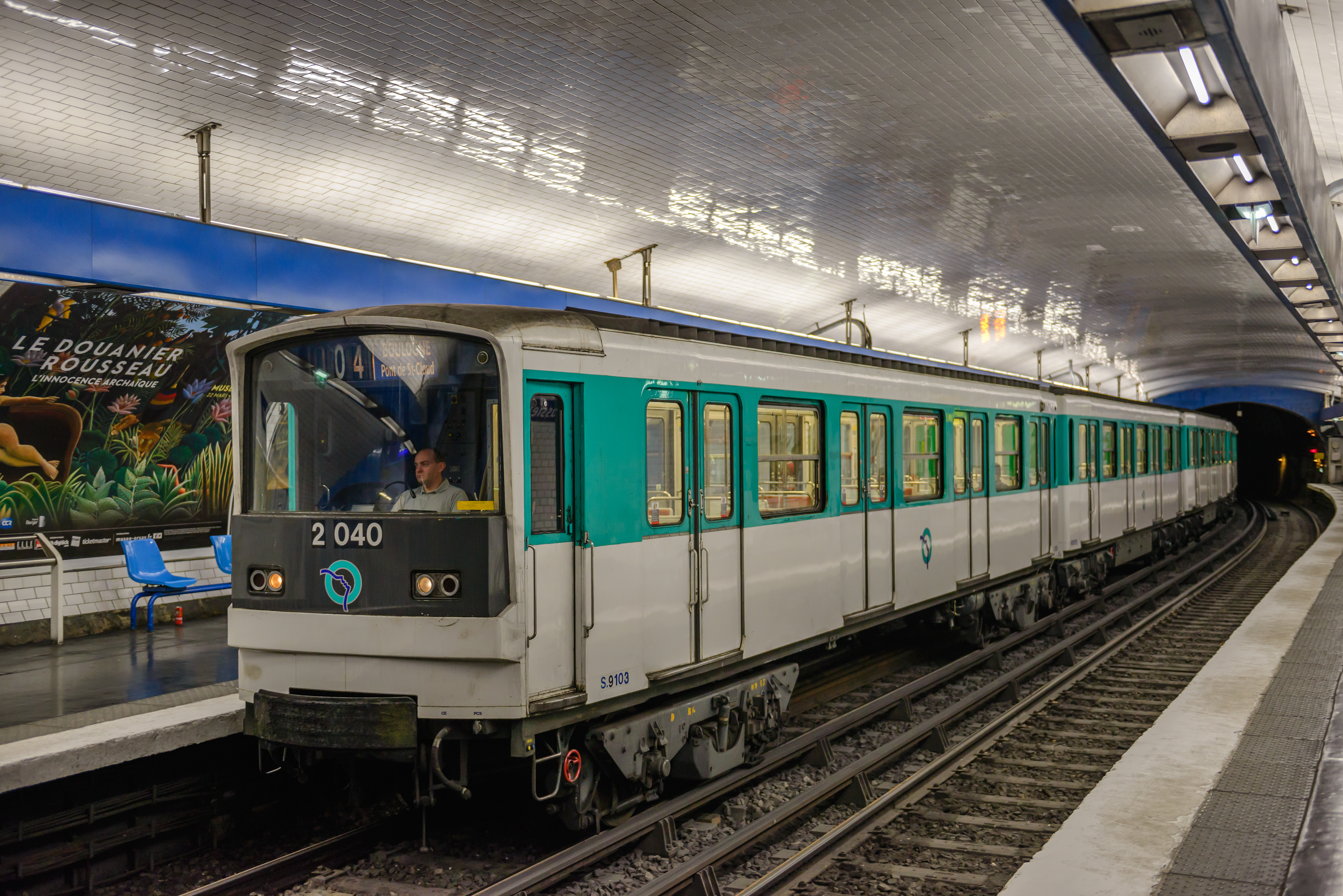 Un MF67 à face noire (différente par ailleurs des vertes qui ont une "nervure" au dessus des phares) en direction de Boulogne. Bus transport in Paris and Île-de-France.